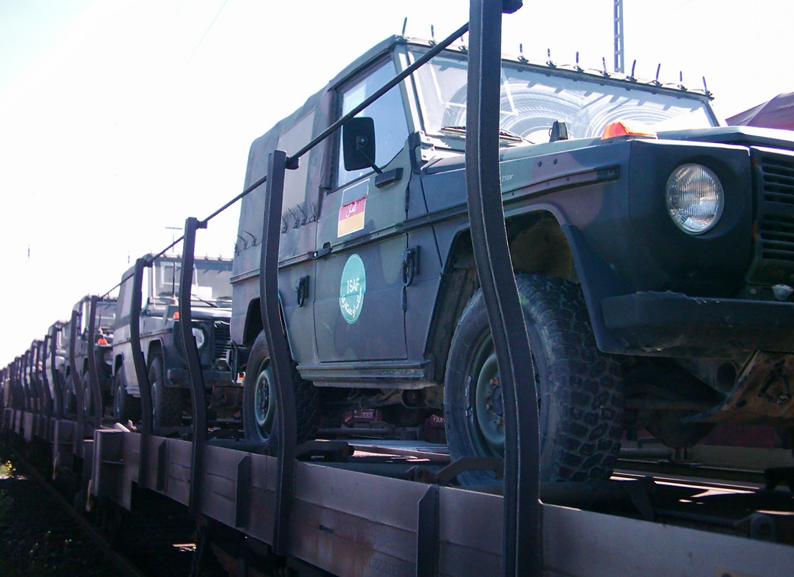 Eine Kolonne Bundeswehrfahrzeuge für den ISAF-Einsatz. Verladen auf Güterwagen der Bahn.